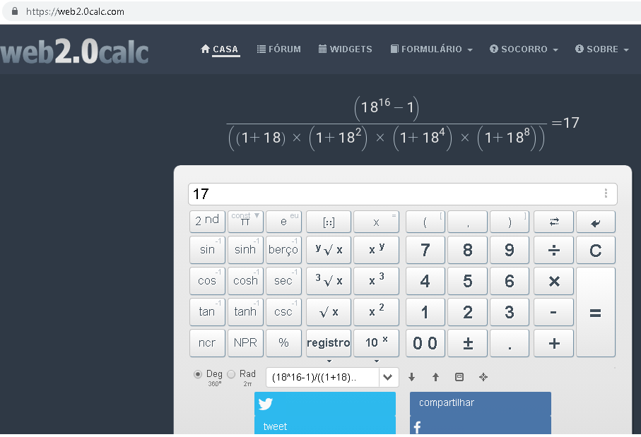 É um site que calcula cálculos com expressões algébricas, calculadora Cientifica da web 2.0